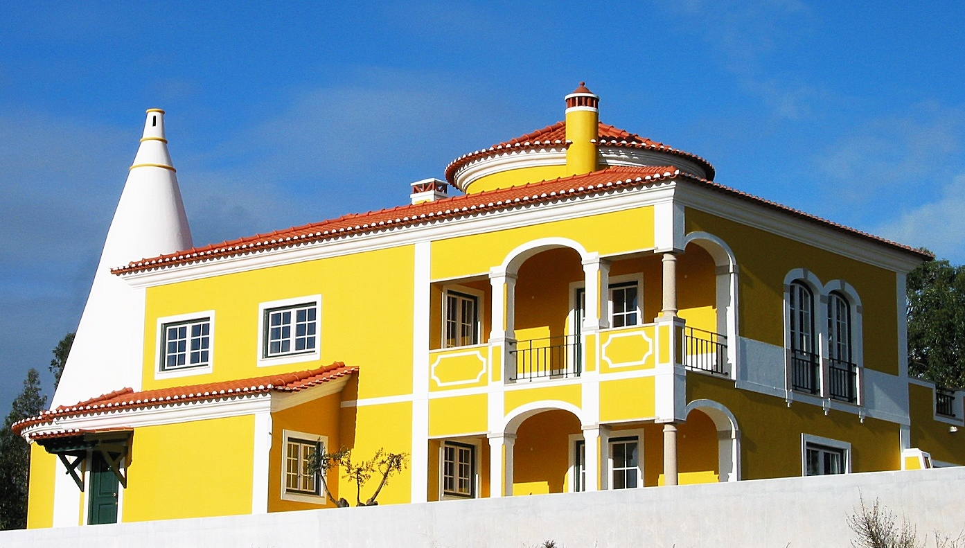 December 2002